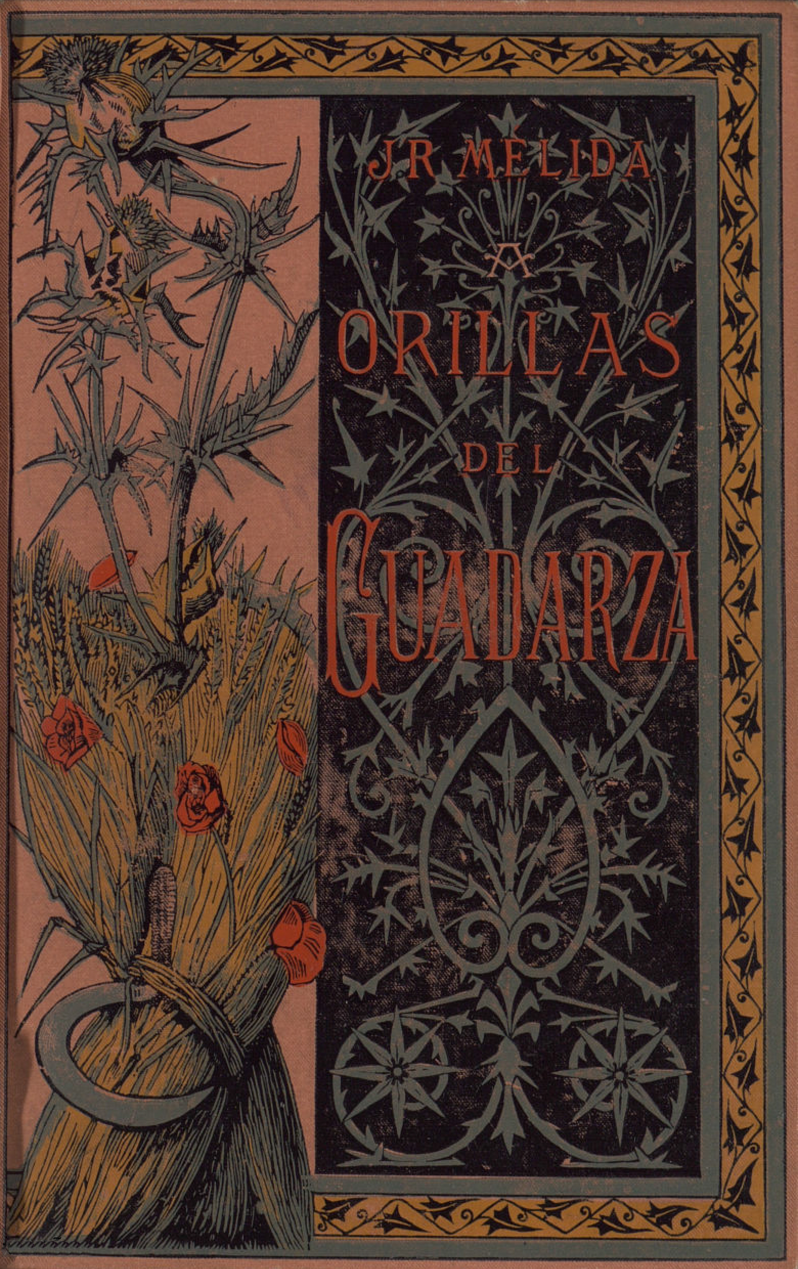 Portada de A orillas del Guadarza.